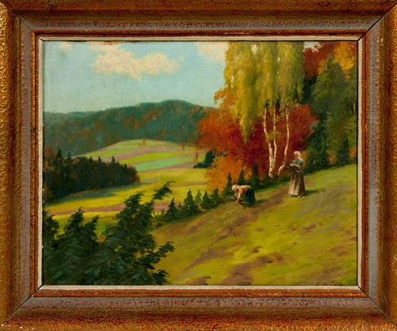 Sbírání klestí